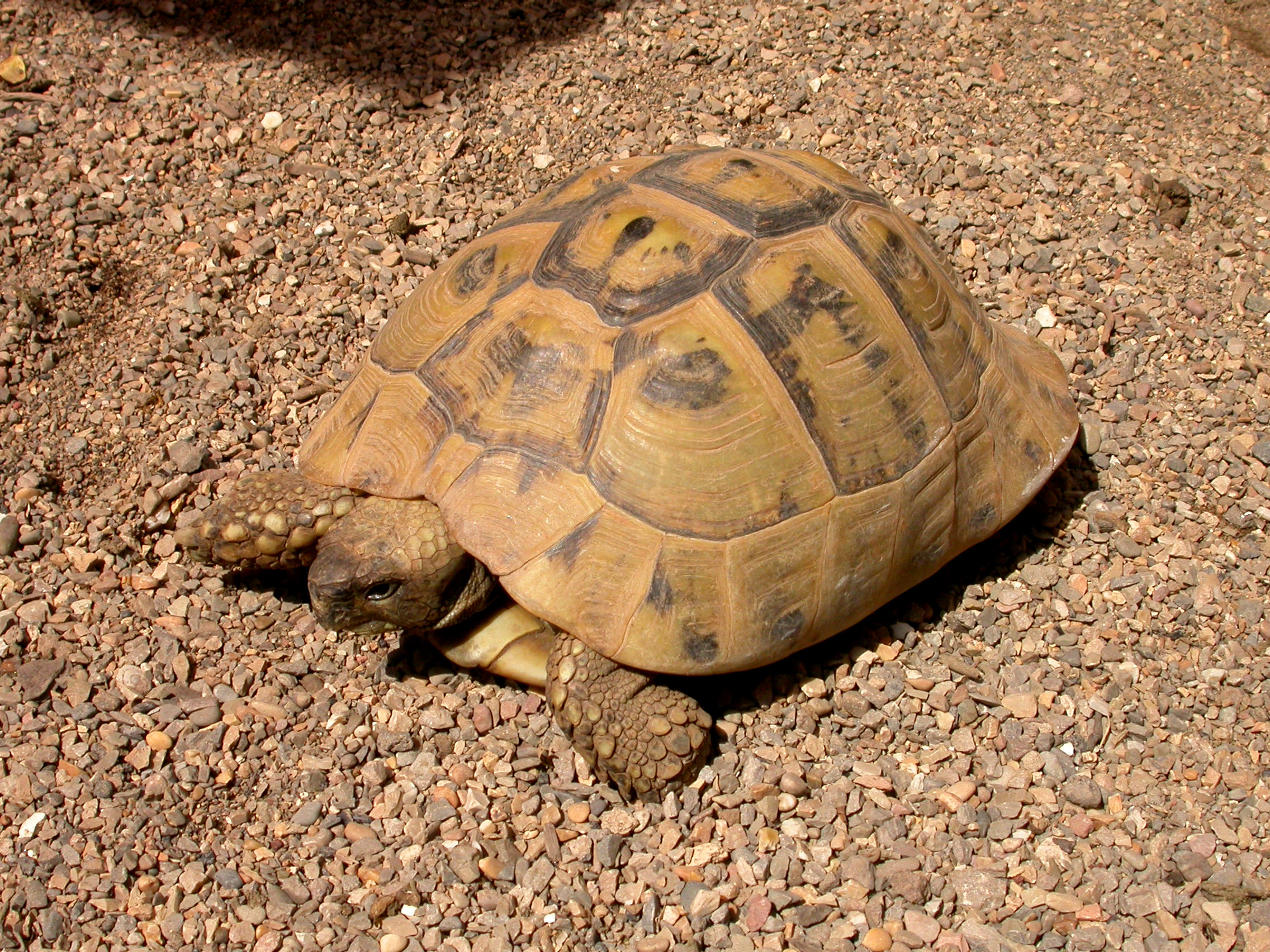 Testudo hermanni boettgeri female Melnik, Bulgaria